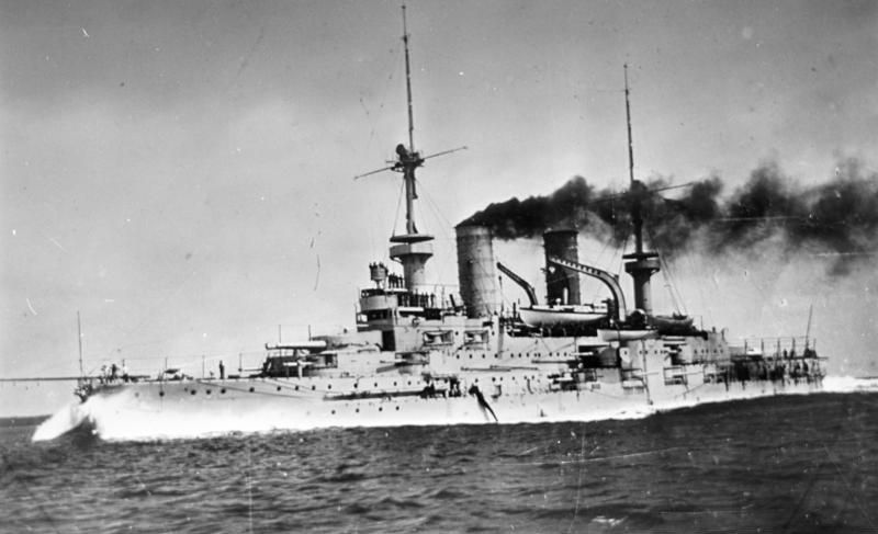 Linienschiff "SMS Wittelsbach" Linienschiff "S.M.S. Wittelsbach", Flaggschiff der Wittelsbach-Klasse in Fahrt auf See, Ansicht der Backbord-Seite